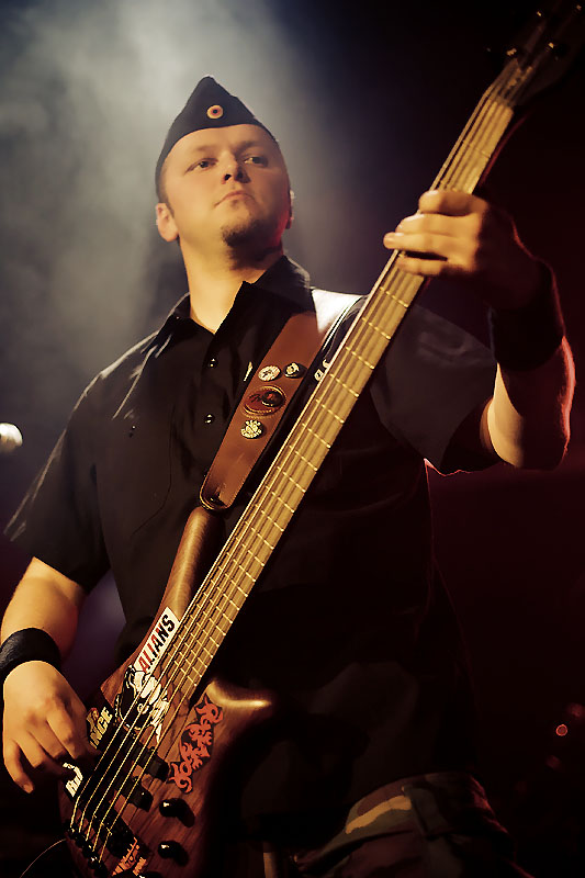 Nomad, Wrocław, Firlej, 13.05.2011